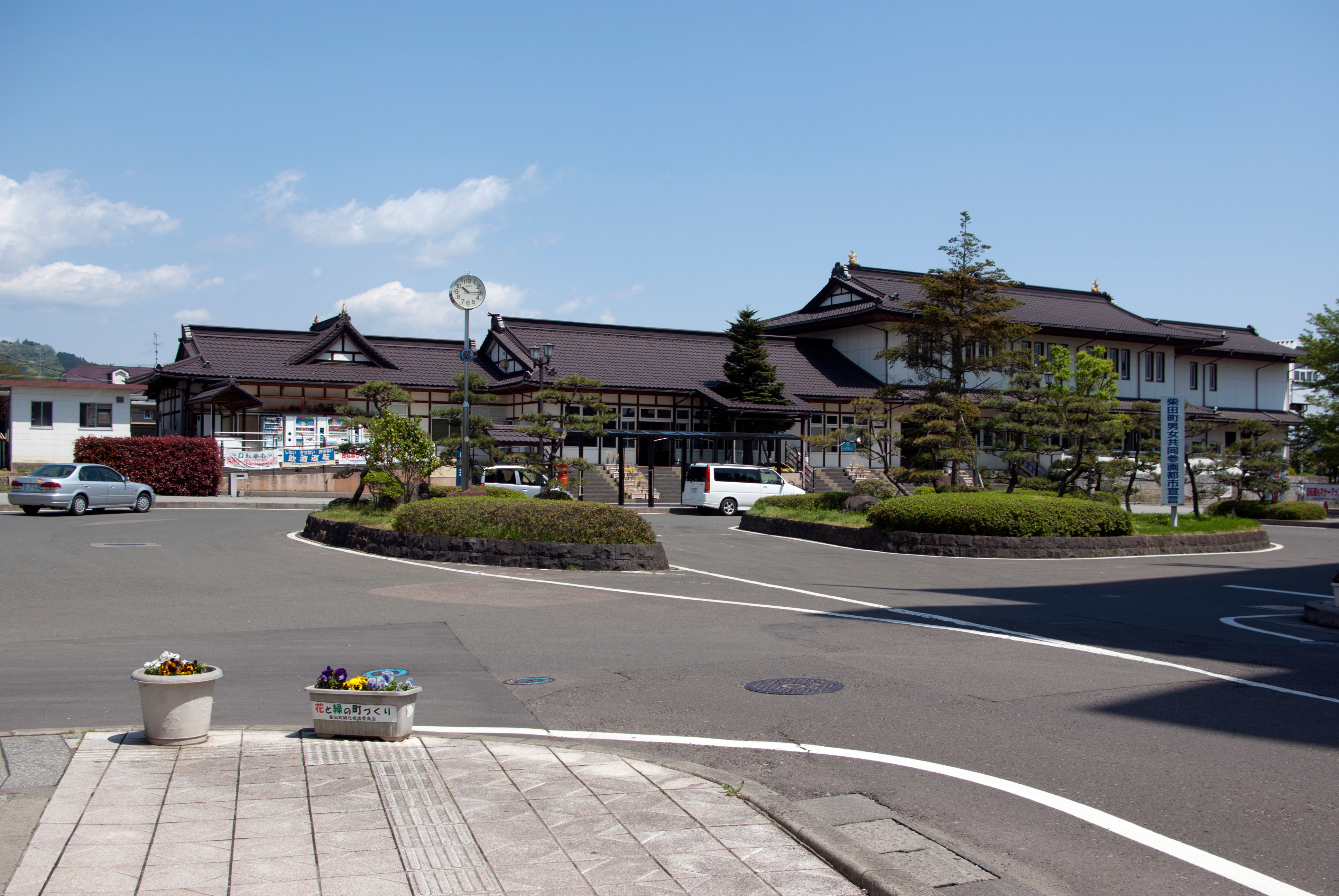 東日本旅客鉄道株式会社東北本線船岡駅